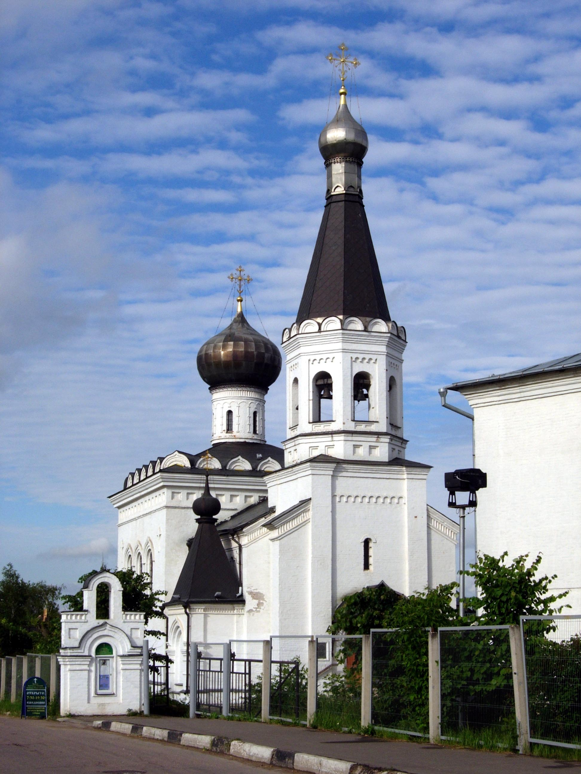 Храм Тихона Задонского (Клин)